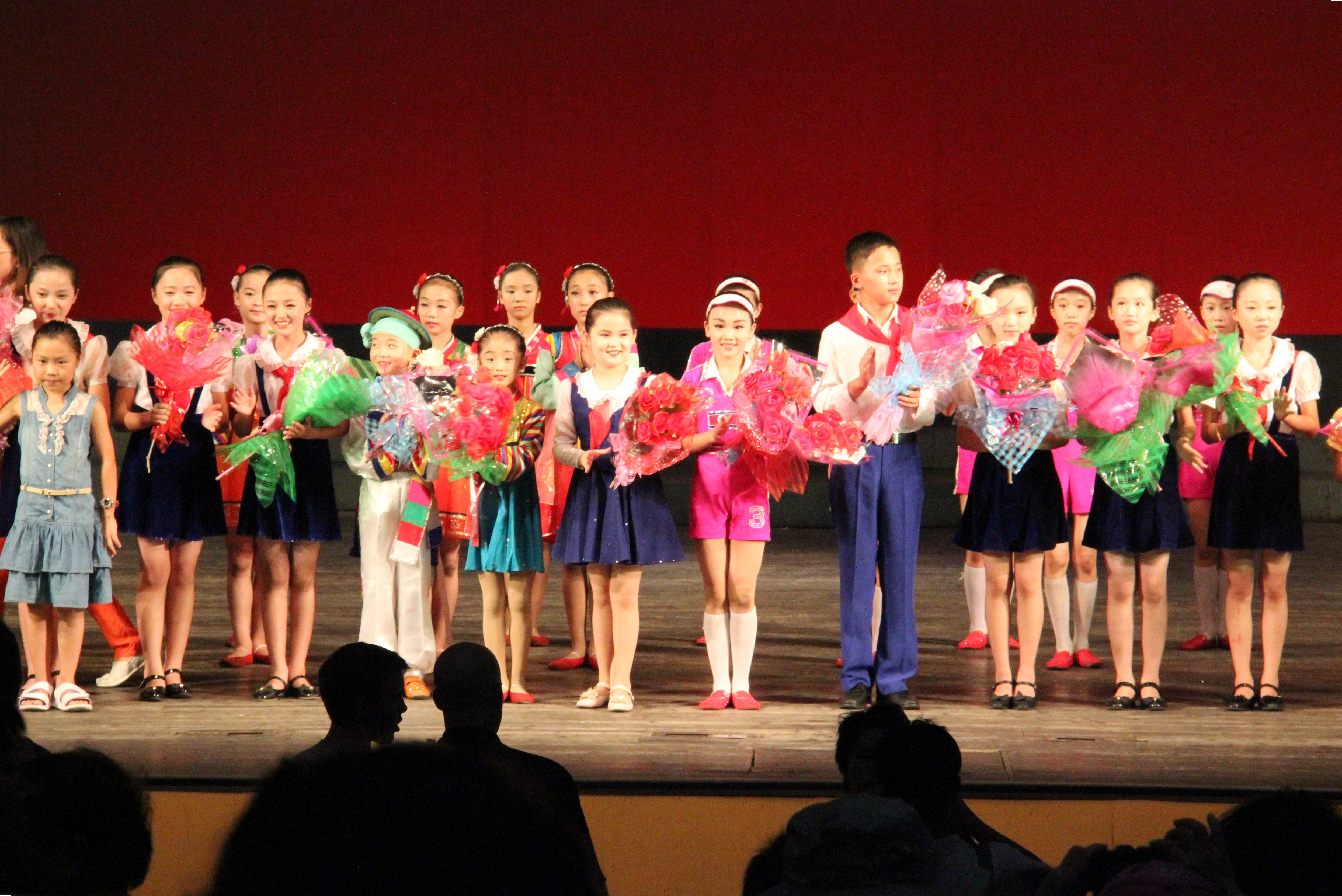 Pyongyang Children's Palace